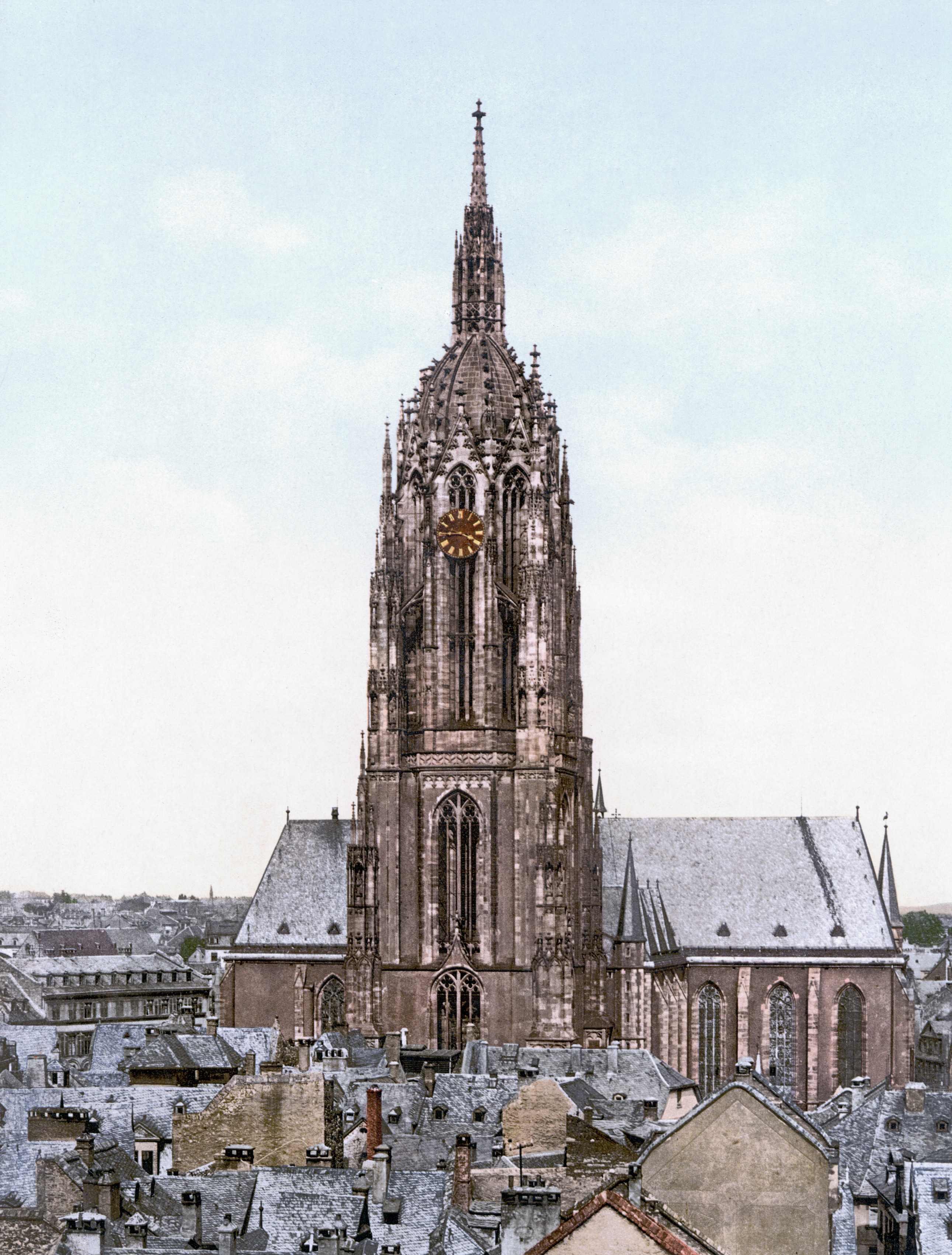 Frankfurt, Dom